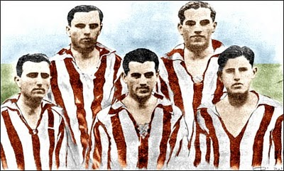 Οι αδερφοί Ανδριανόπουλοι